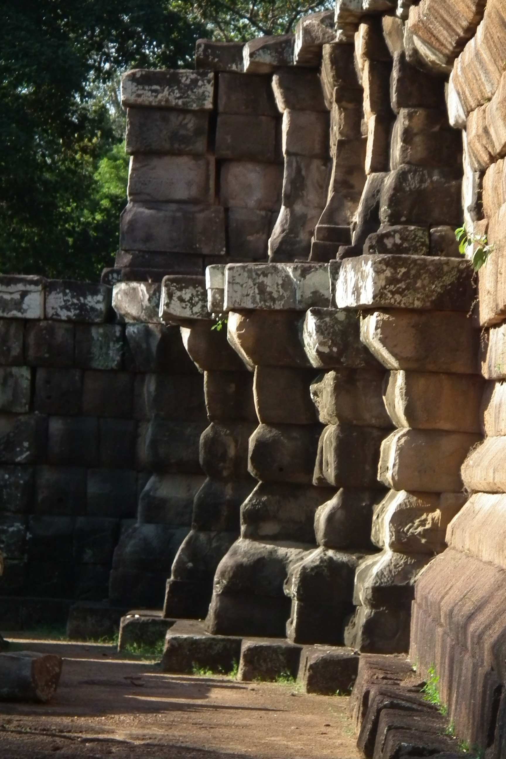 Ta Keo (Khmer ប្រាសាទតាកែវ) Angkor Cambodia タ・ケウ Photo:Akiyoshi Matsuoka